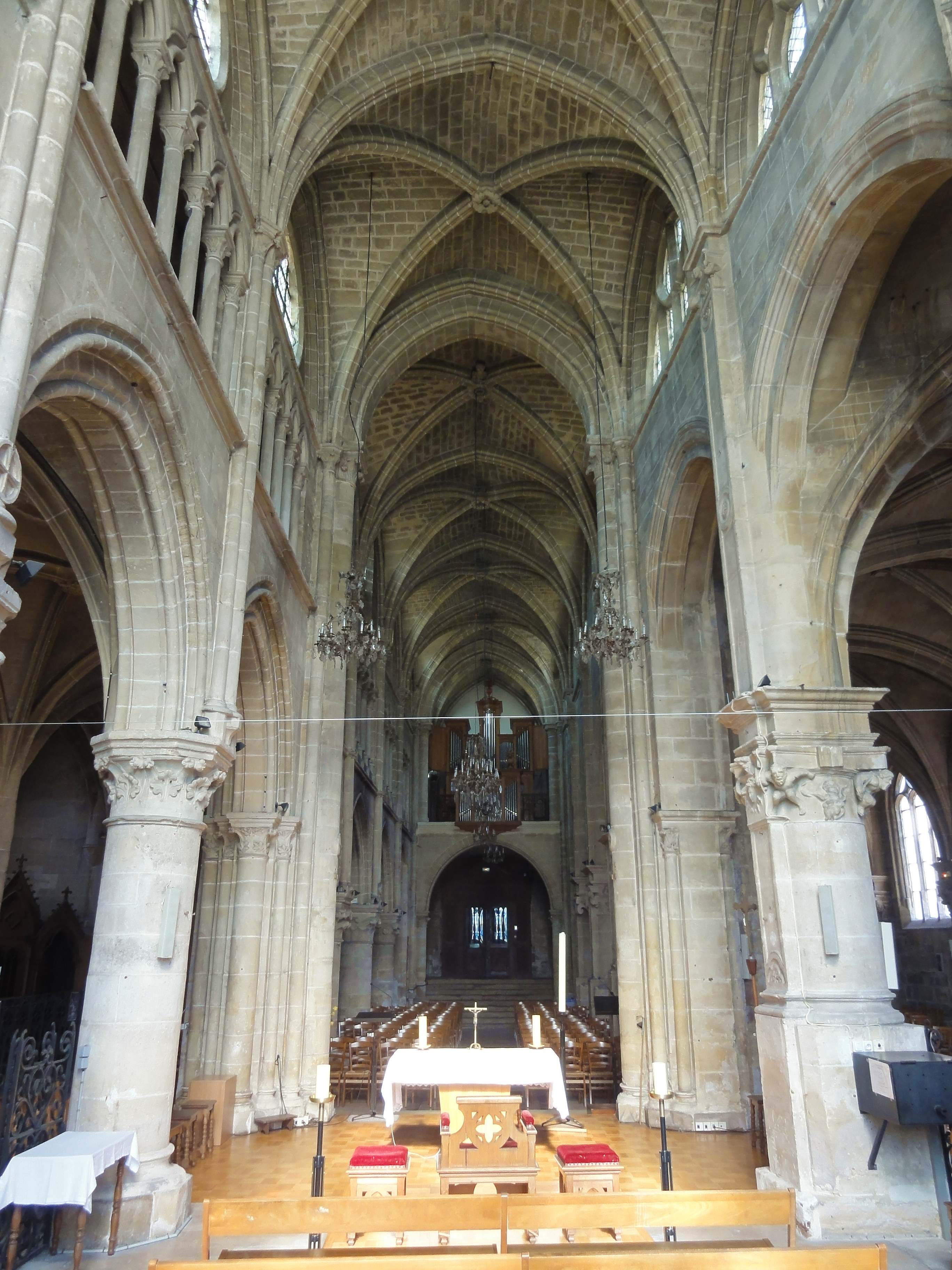 Intérieur de l'église - voir titre.